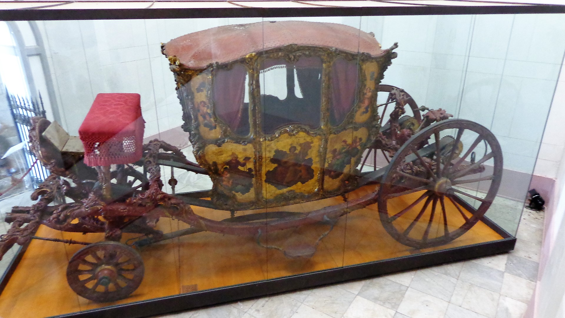 Carrozza custodita a palazzo dei Normanni, Palermo.